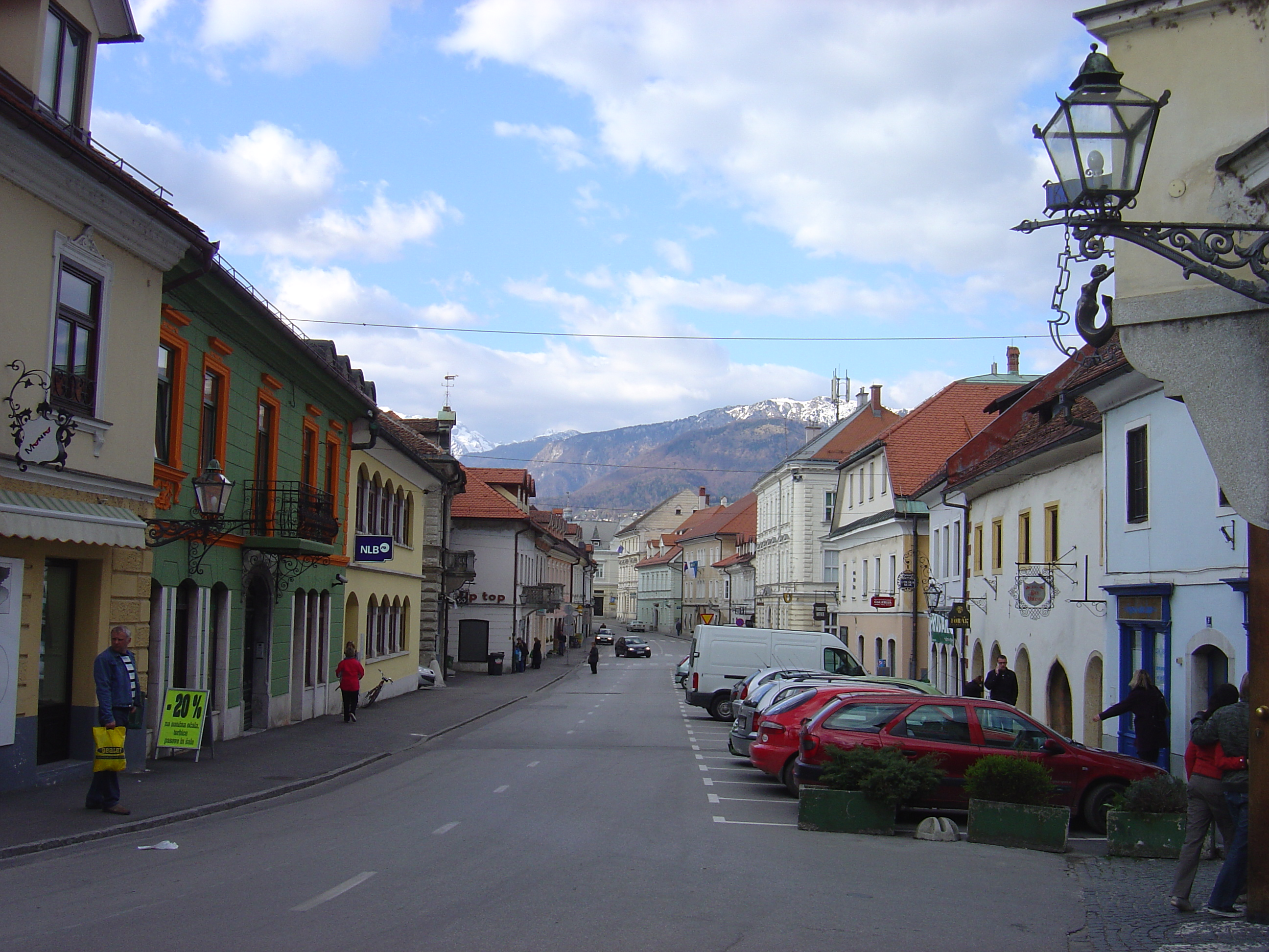 Kamnik, Slovenia